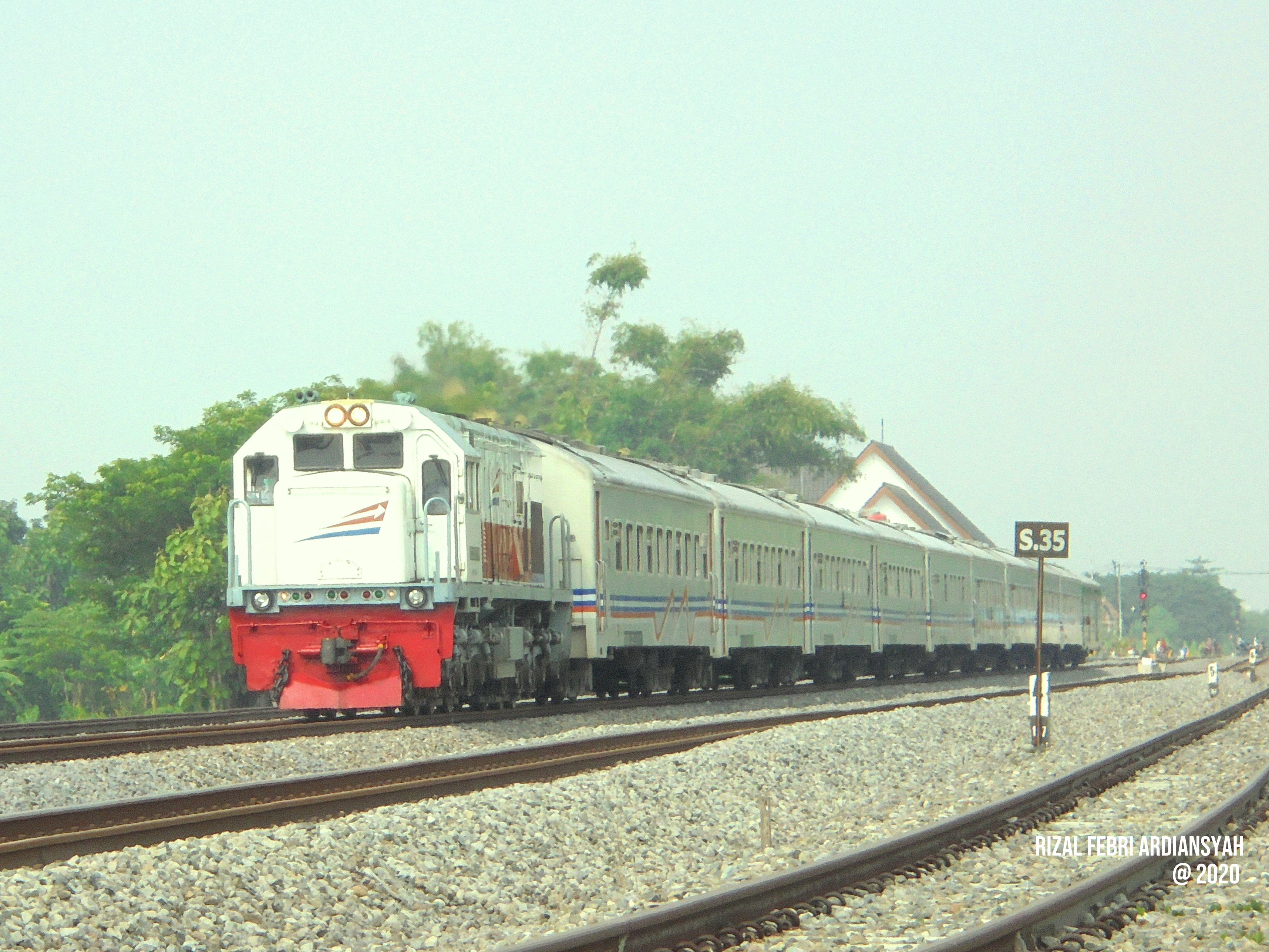 Kereta api Majapahit tujuan Malang saat melintas langsung Stasiun Babadan, Kabupaten Madiun